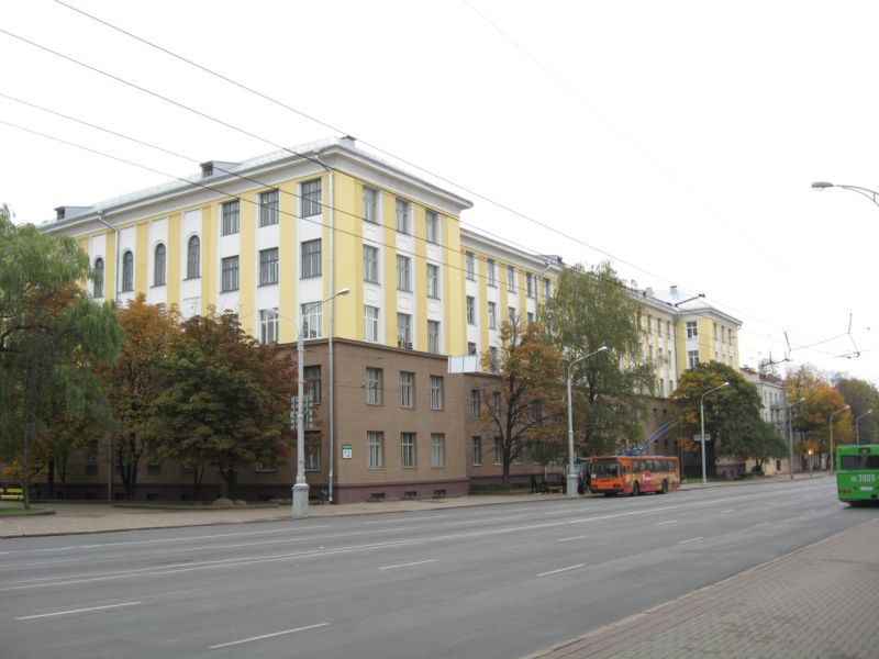 1 корпус БГТУ